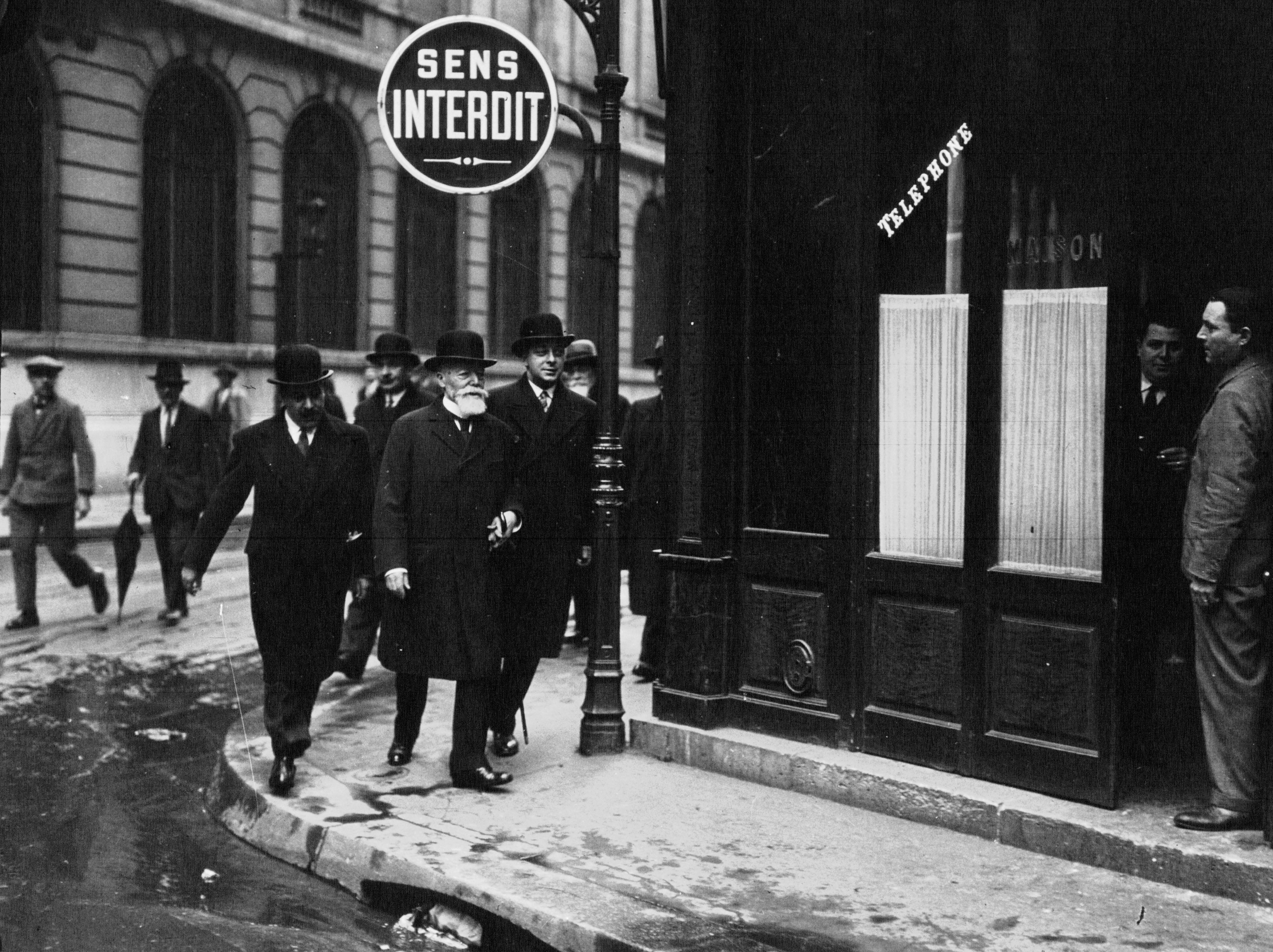 Le président de la République française Paul Doumer se rendant au bureau de vote à l'occasion des élections législatives de 1932.